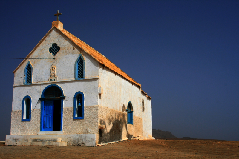 Capela e marca diurna em Pedra de Lume, ilha do Sal, Cabo Verde.